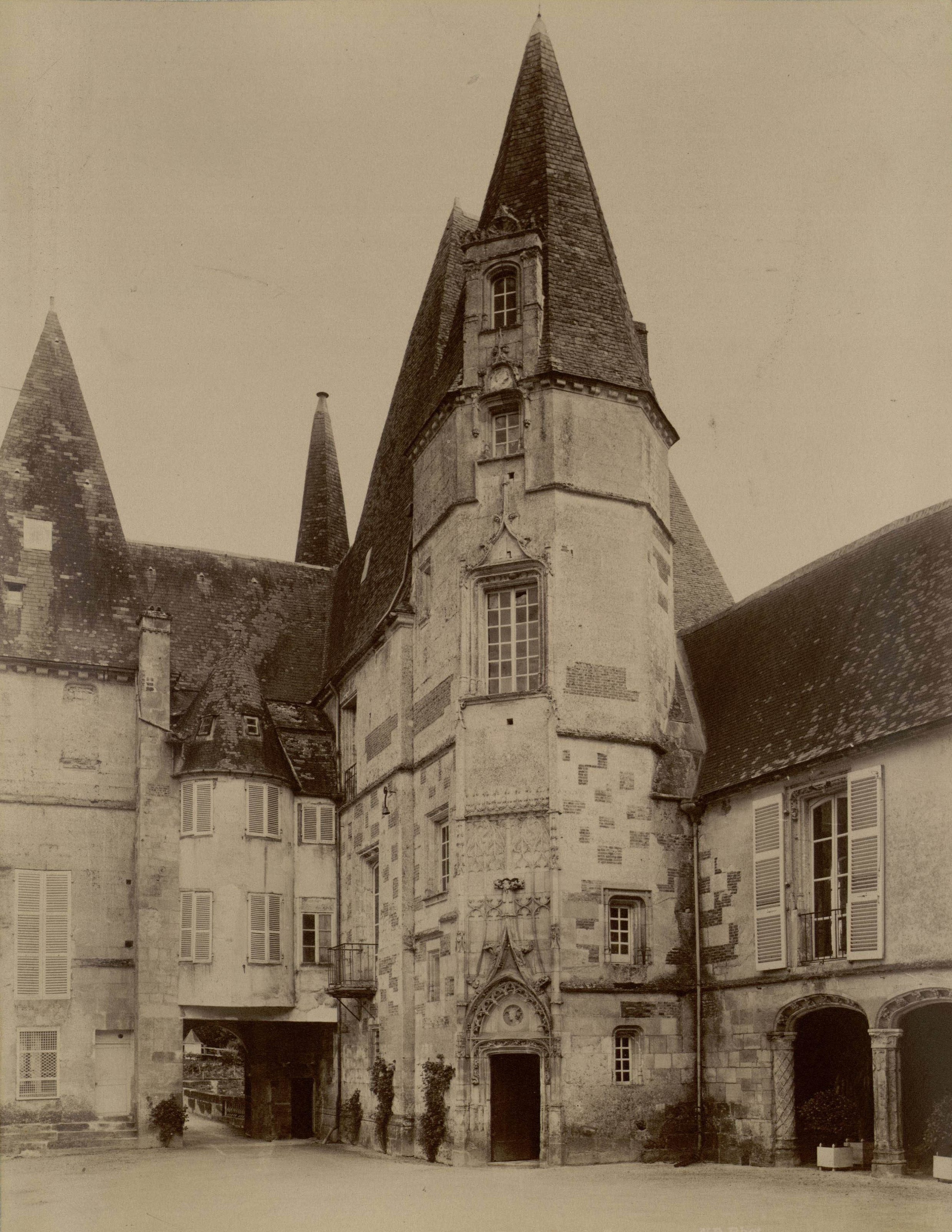 Ansicht des Innenhofes von Schloss O in Mortrée, Frankreich